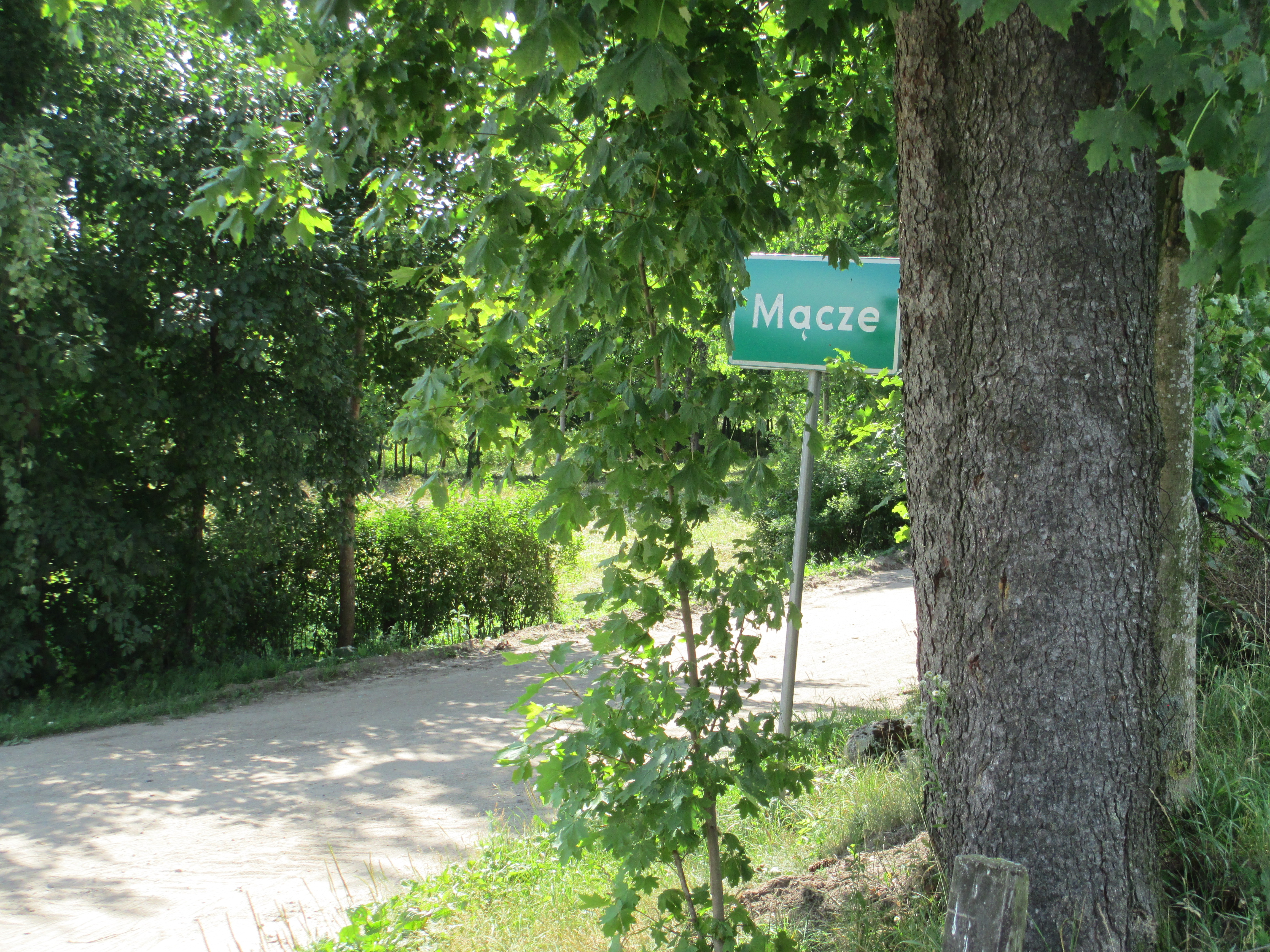 Mącze - gm. Ełk